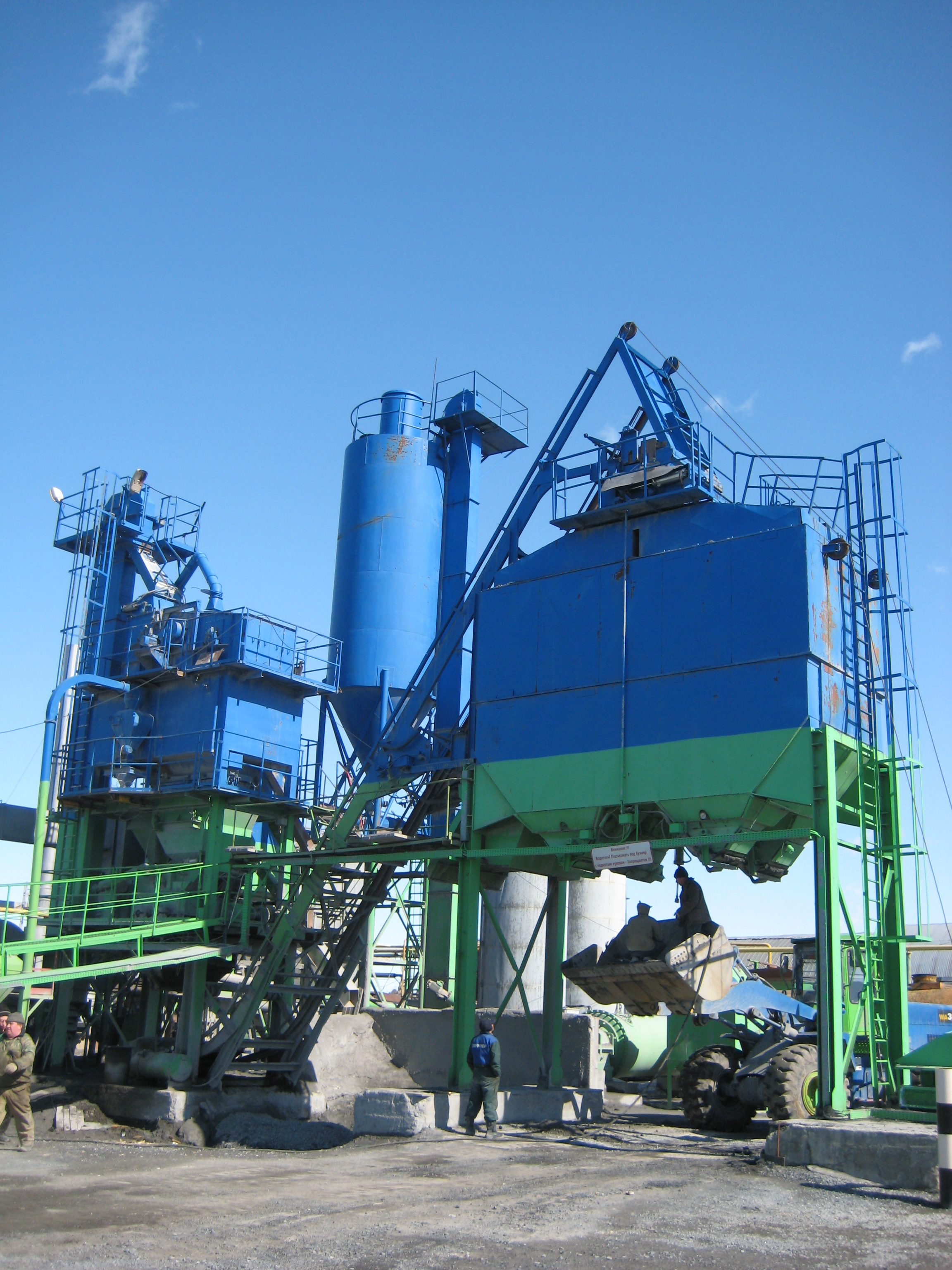 Завод г. Белоярский